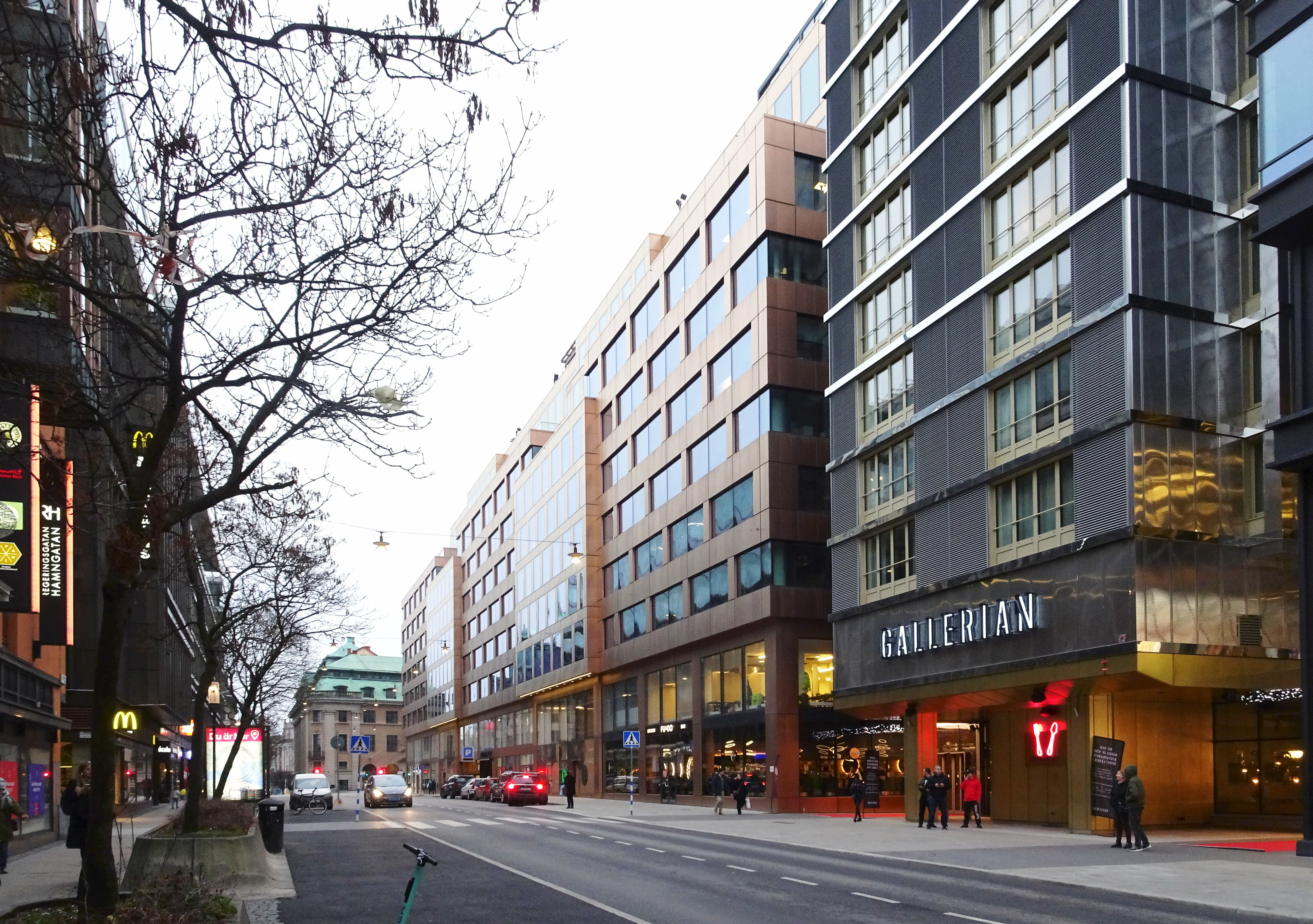 Byggnad i fastigheten Trollhättan 31, Jakobsgatan 10, Regeringsgatan 13-19. Upphovsman Boijsen & Efvergren Arkitektkontor AB , Malmquist & Skoog Arkitektkontor. Förvaltningsaktiebolaget Holmia AB (Byggherre).